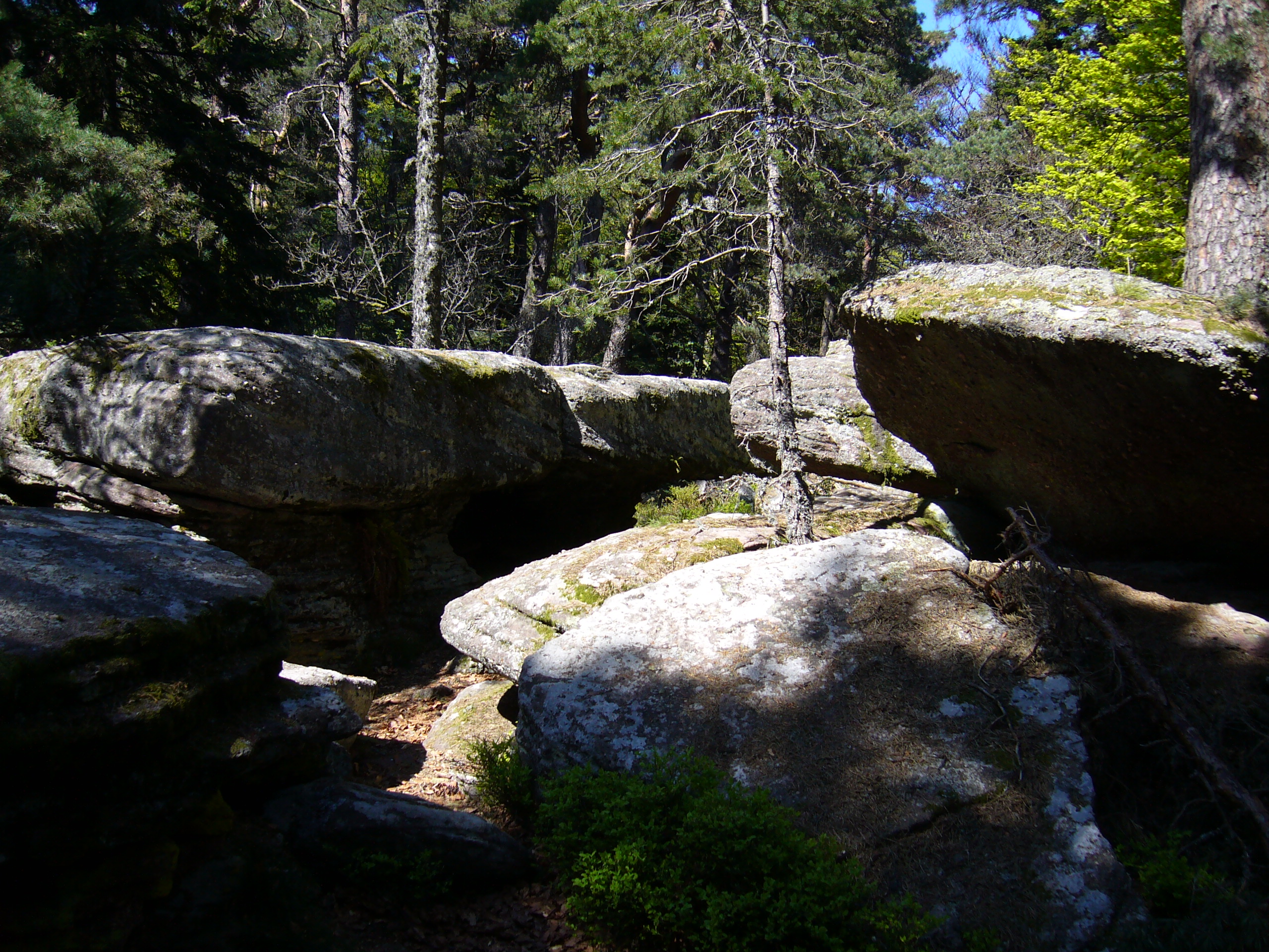 Taennchel 502.JPG